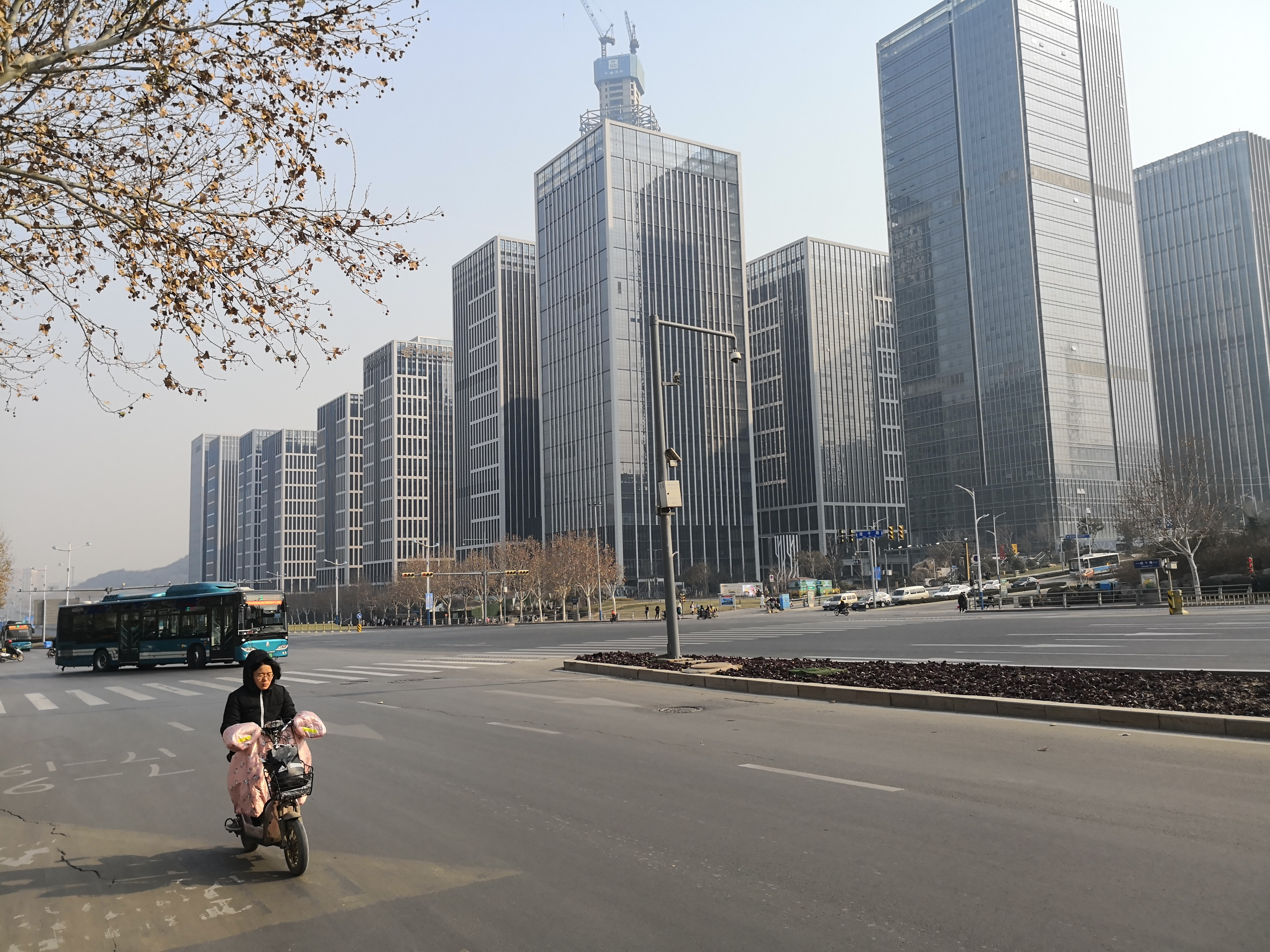 从经十路舜华南路路口西北侧拍摄汉峪金谷